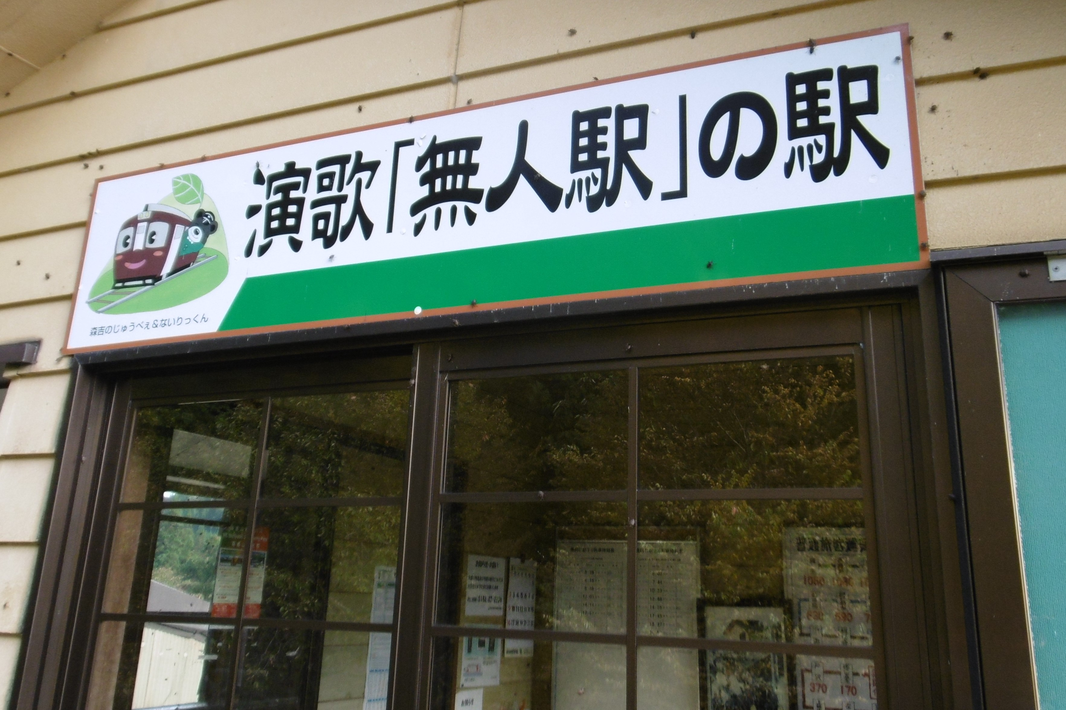 秋田内陸線 奥阿仁駅 待合室・秋田県北秋田市